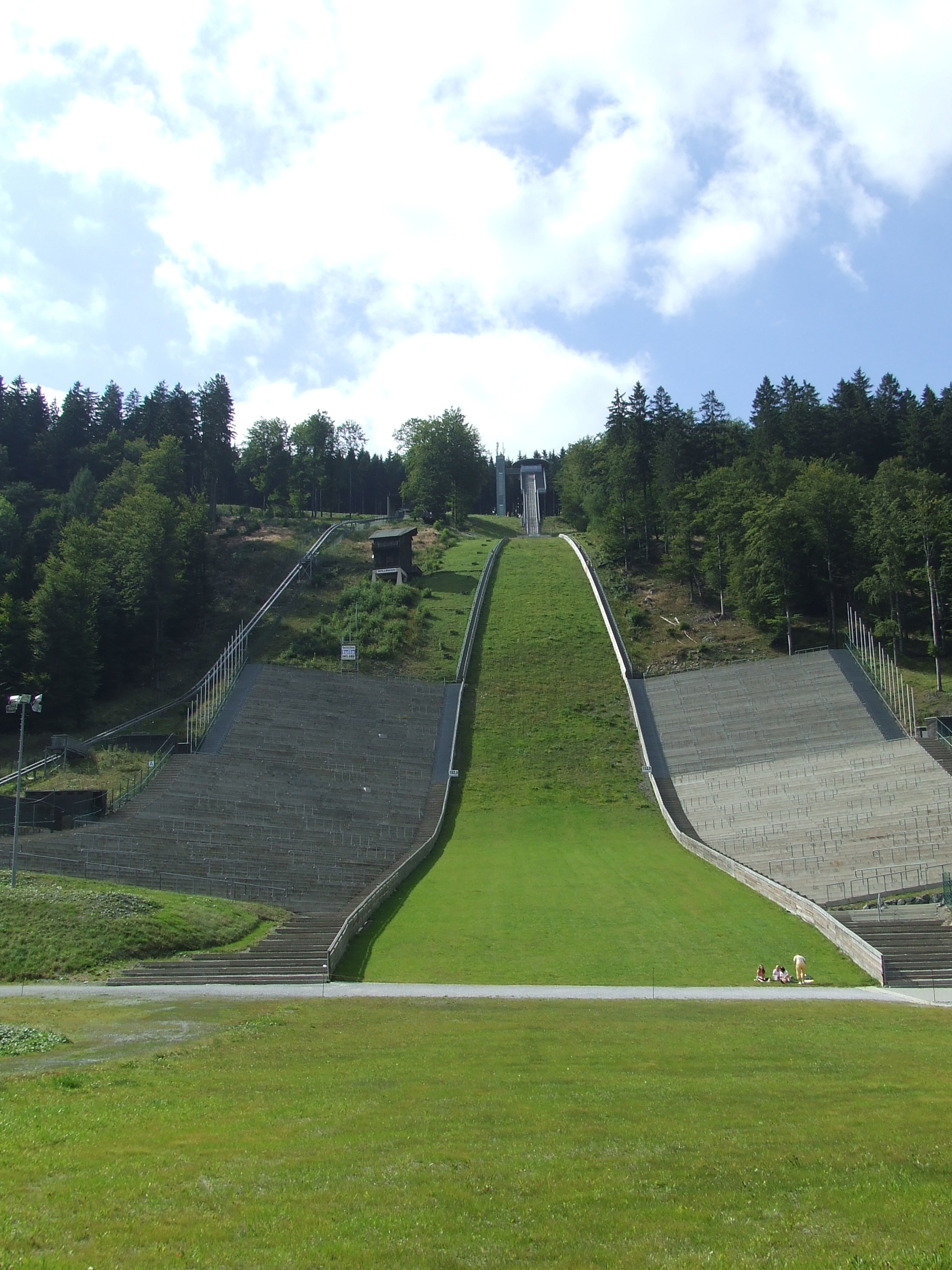 Full view of the Mühlenkopfschanze in Willingen Germany